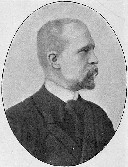 Дмитрий Петрович Голицын-Муравлин